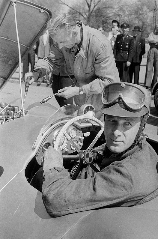 Original image description from the Deutsche FotothekPortrait Paul Thiels in einem EMW 1500ccm-Sportwagen beim 6. Leipziger Stadtparkrennen